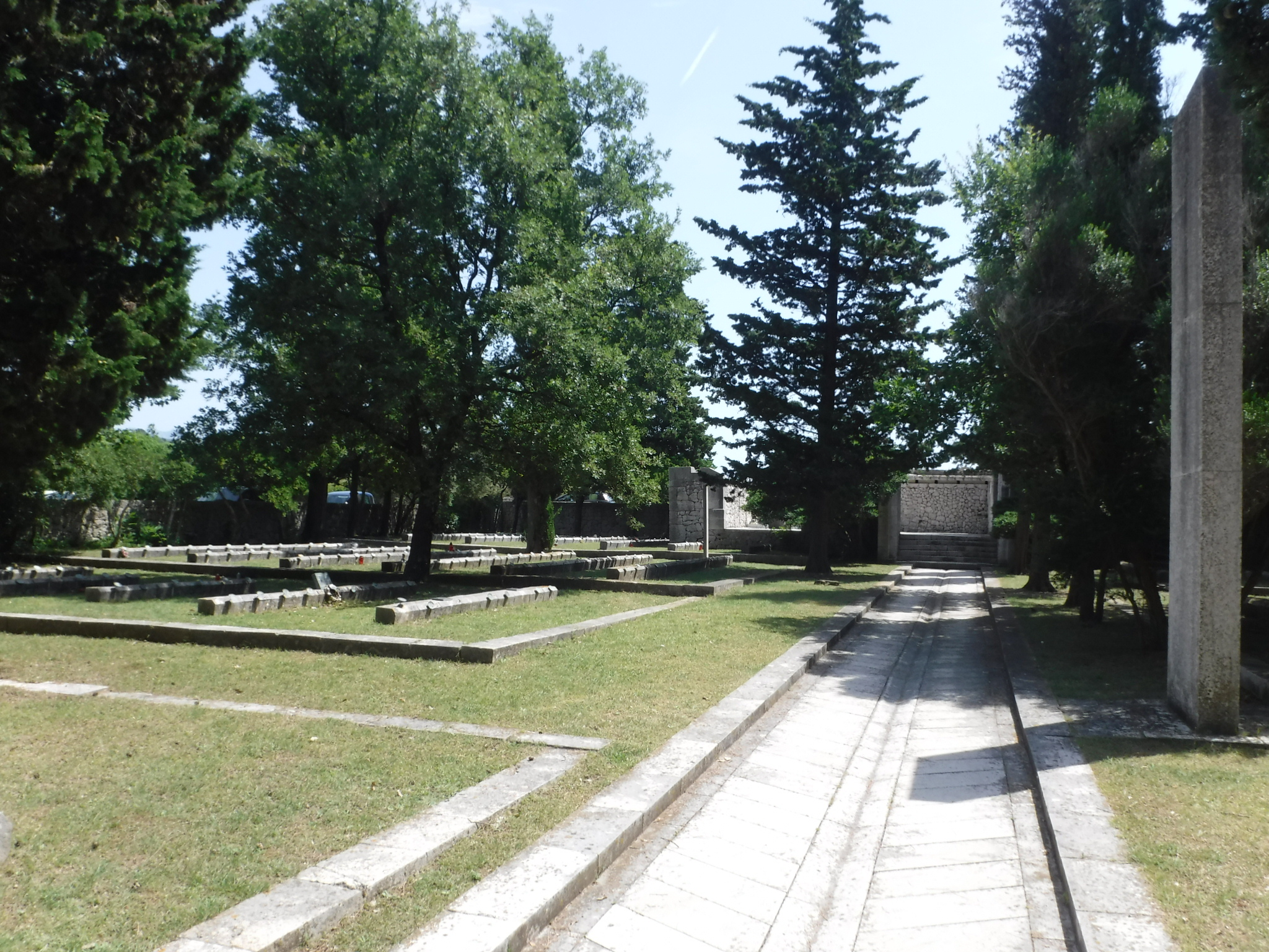 Das Konzentrationslager Rab (campo di concentramento Rab) bei Kampor auf der kroatischen Insel Rab (isola de Arbe-Fiume), deshalb mitunter auch Konzentrationslager Kampor oder Konzentrationslager Arbe genannt, wurde während des Zweiten Weltkrieges im Juni 1942 errichtet. Nach dem italienischen Waffenstillstand von Cassibile wurde es im September 1943 aufgelöst.